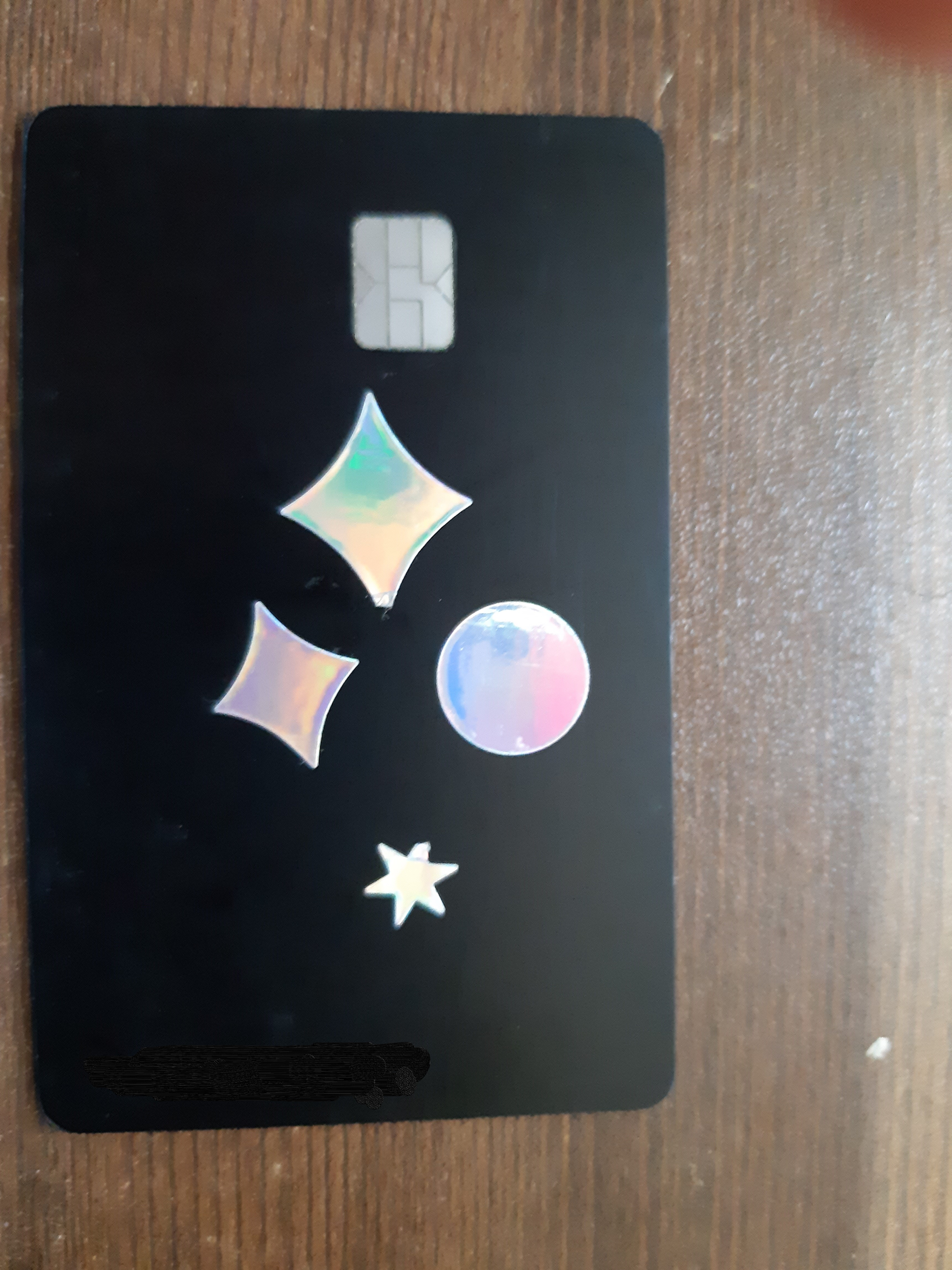 토스 머니 카드(개인 정보 가림)